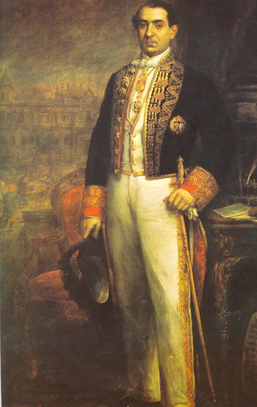 El empresario vasco afincado en Andalucía José María de Ibarra y Gutiérrez de Caviedes